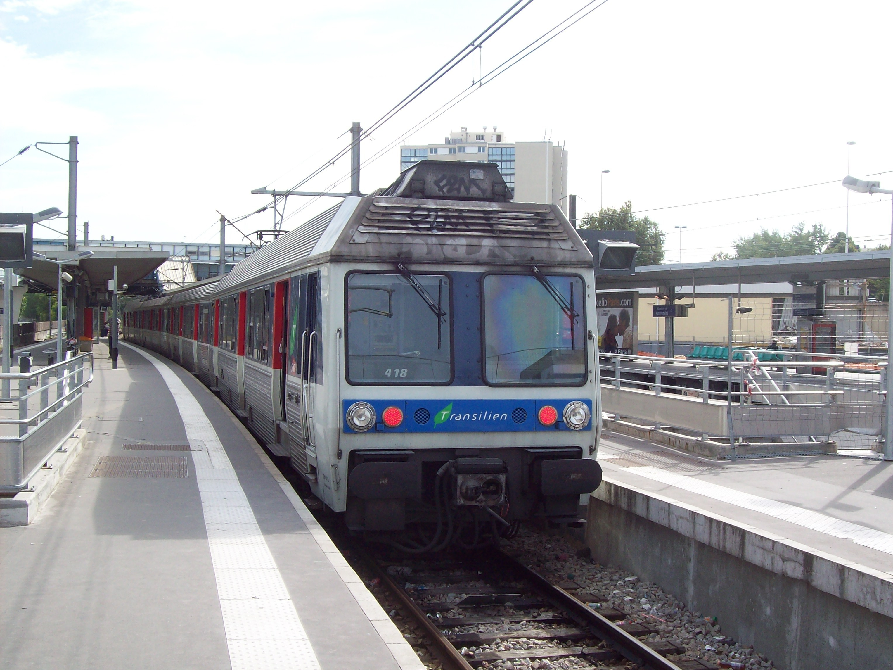 A Z 6400 EMU at Nanterre-Universite for/to Paris-Saint-Lazare Une Z 6400 à Nanterre-Université en direction de Paris-Saint-LAZARE